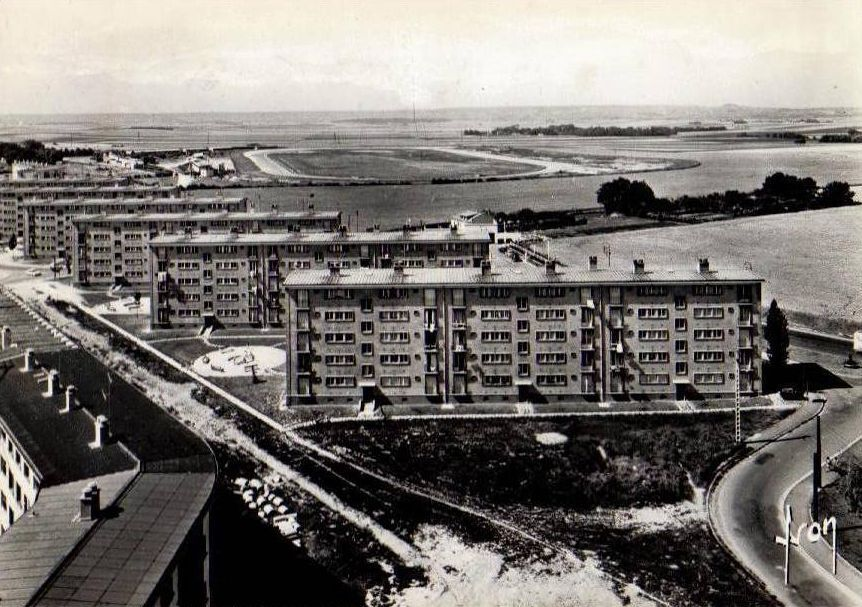 Quartier Maison-Blanche